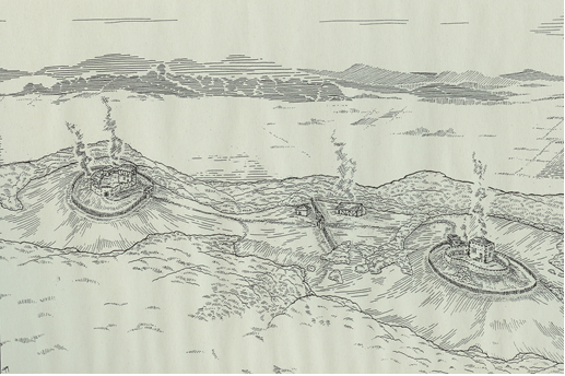 Diese Zeichnung entstand nach der Vorlage der Vermessungsarbeiten auf den beiden Burgen und ihrem Umfeld.